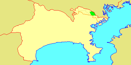 Map of Nakahara-ku, Kawasaki, Kanagawa-prefecture, Japan